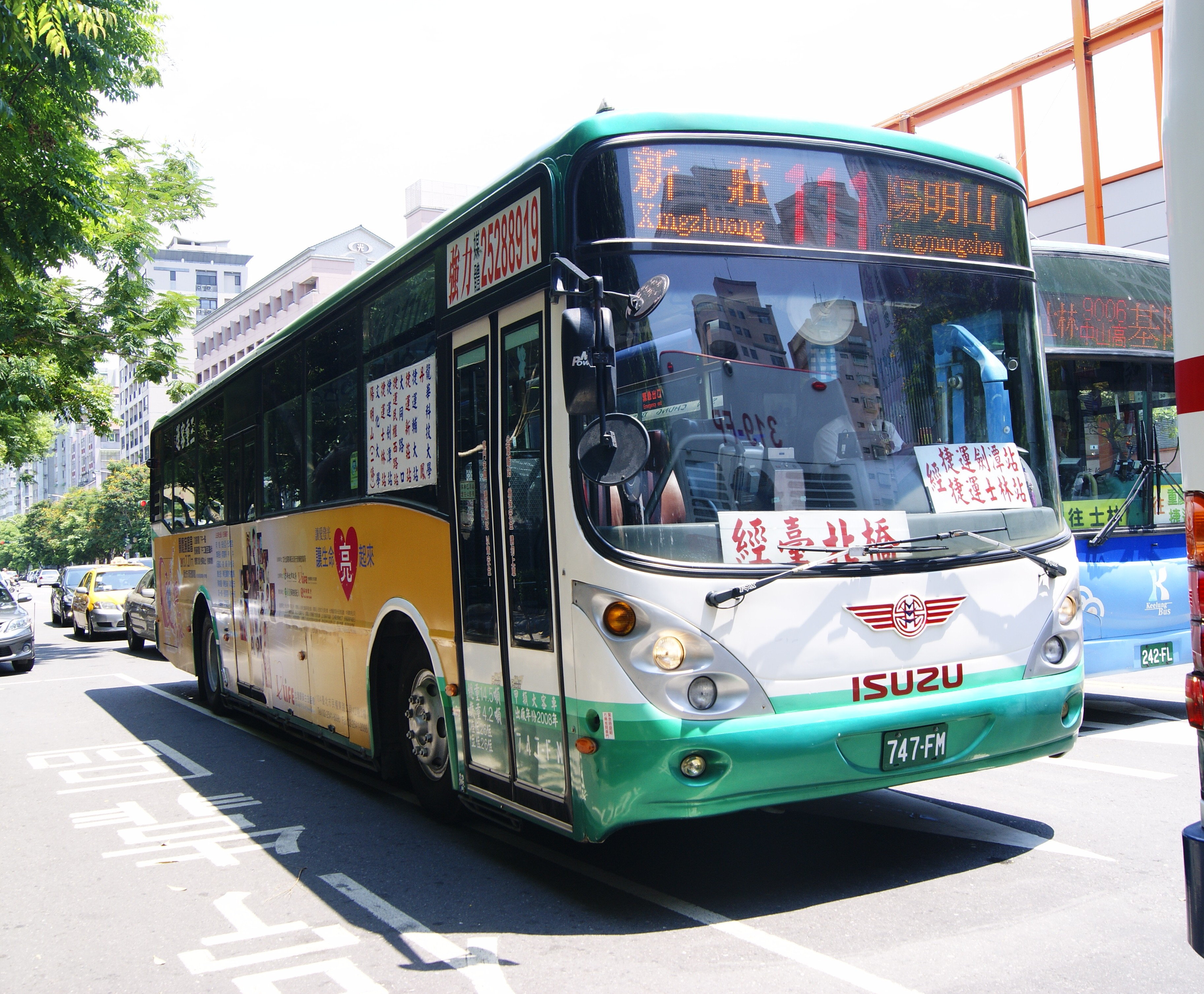 三重客運2008年五十鈴LT134PRK大客車747-FM，行駛臺北市聯營公車休閒公車111線。